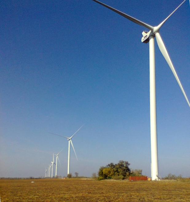 Ботиевская ВЭС (Приазовский р-н, Запорожской обл.)